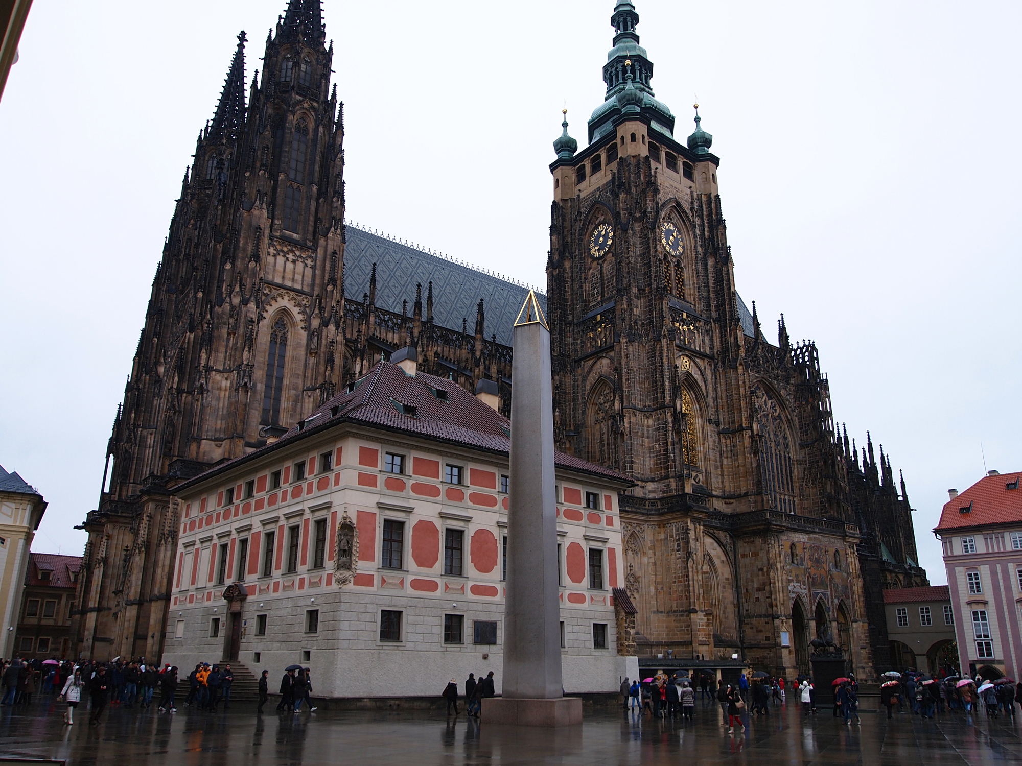 Беларуская (тарашкевіца): Праскі Град